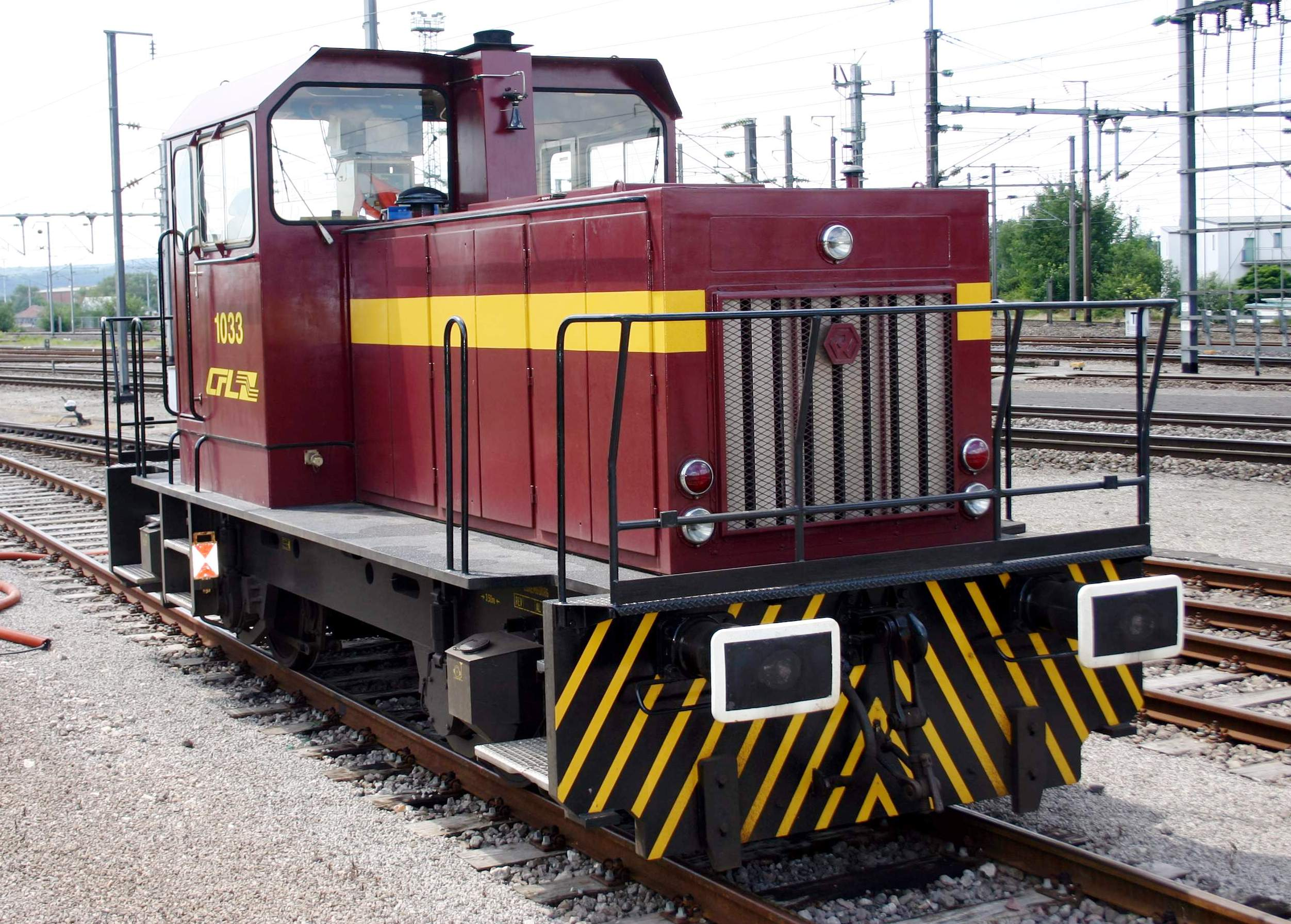 CFL-Lokomotiv 1033. Kategorie:CFL-Lokomotiven